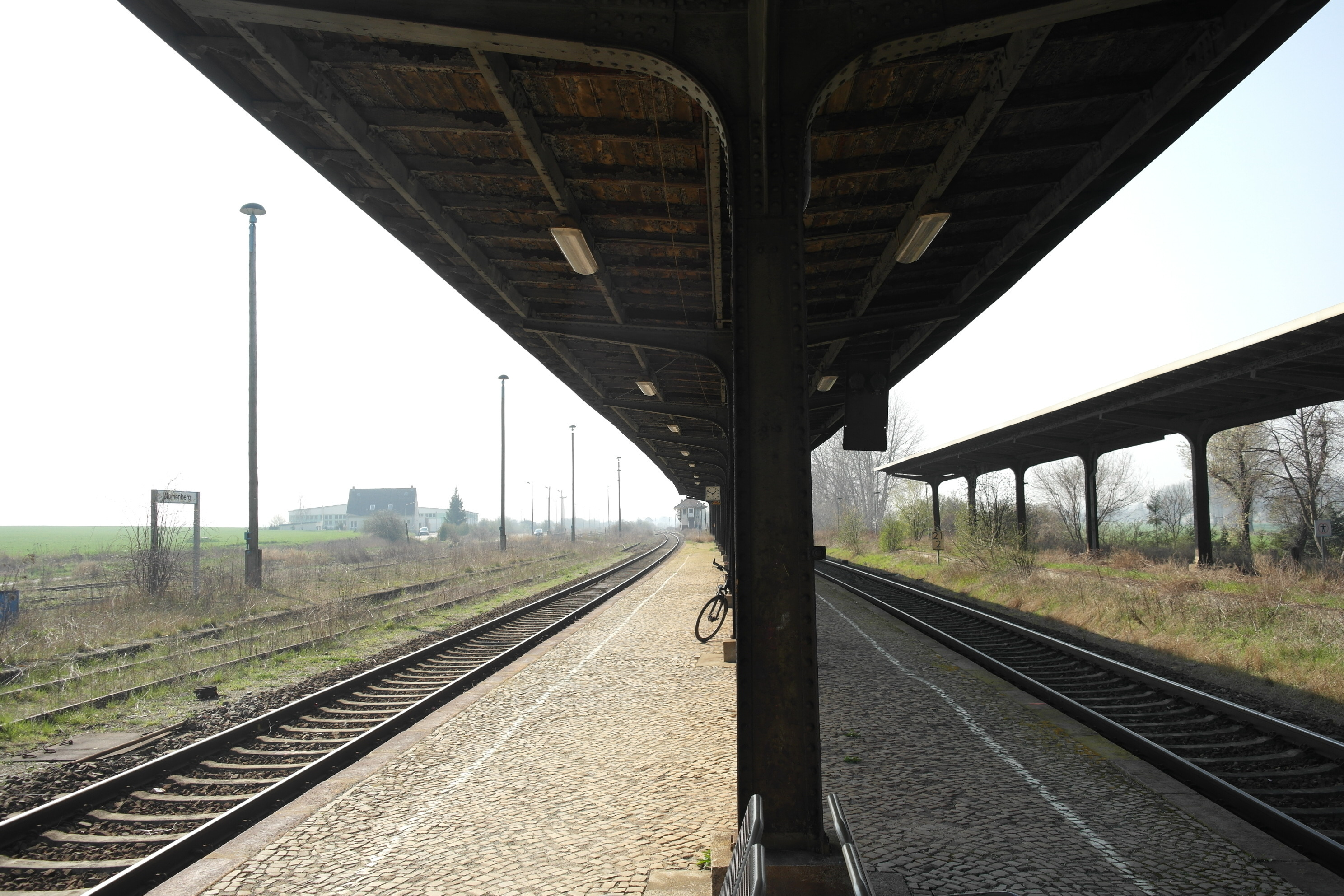 Bahnhof Blumenberg, noch genutzter Bahnsteig 2/3, Blick nach Westen